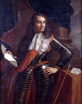 Ritratto di Alfonso II Gonzaga conte di Novellara